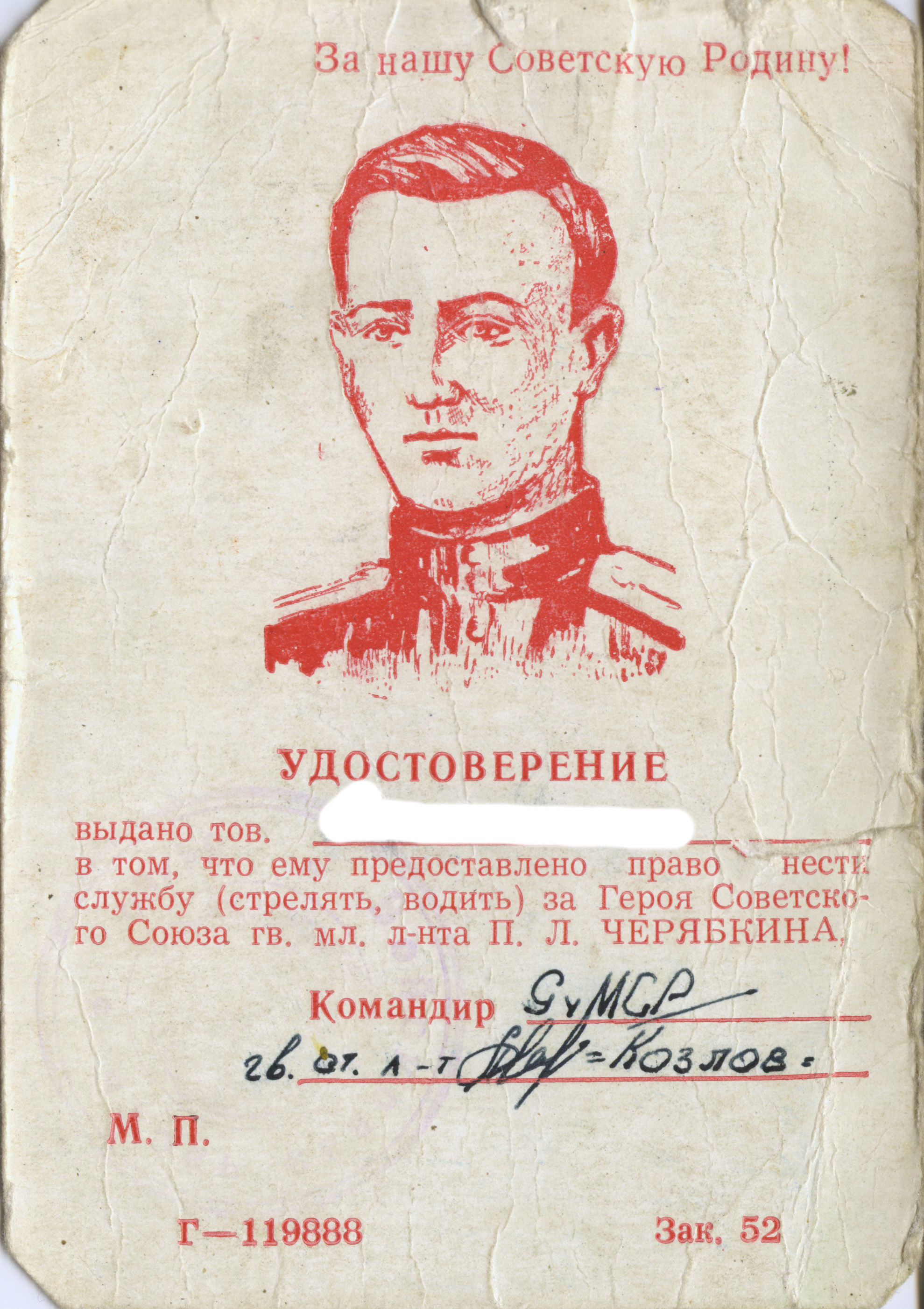 Удостоверение в том, что имяреку предоставлено право нести службу (водить, стрелять) за Героя Советского Союза гв.мл.л-нта Черябкина П.Л.